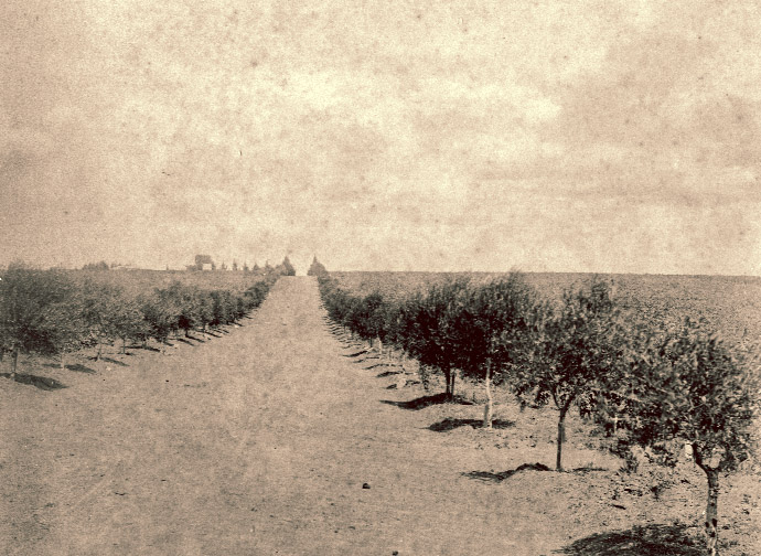 Olivos en 1895